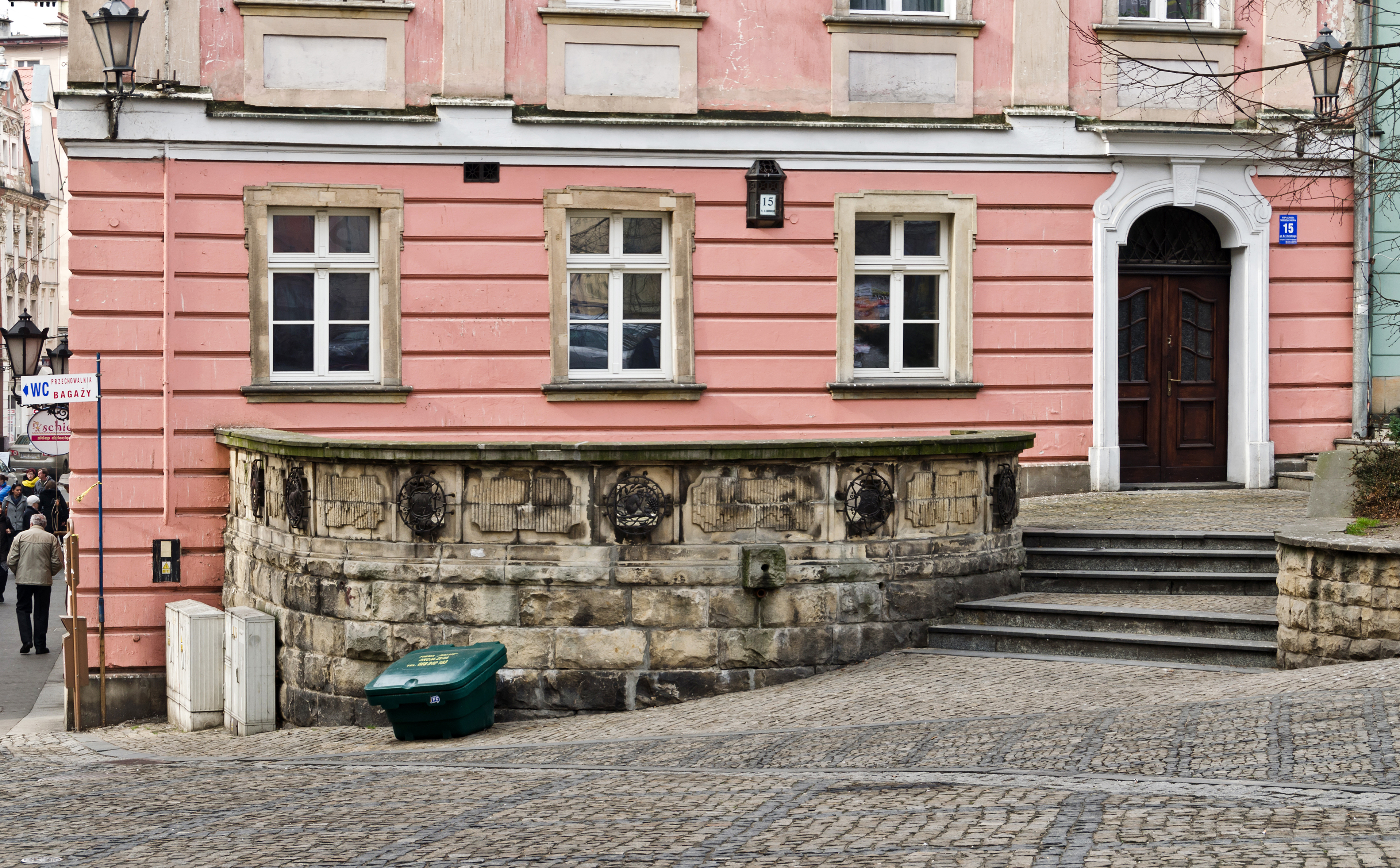 Kłodzko, kamienica